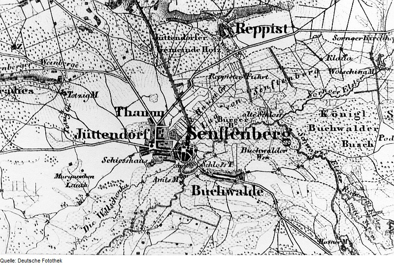 Original image description from the Deutsche Fotothek Senftenberg. Topographische Karte vom Preußischen Staate, Blatt 233 Alt Döbern, aufgen. 1850